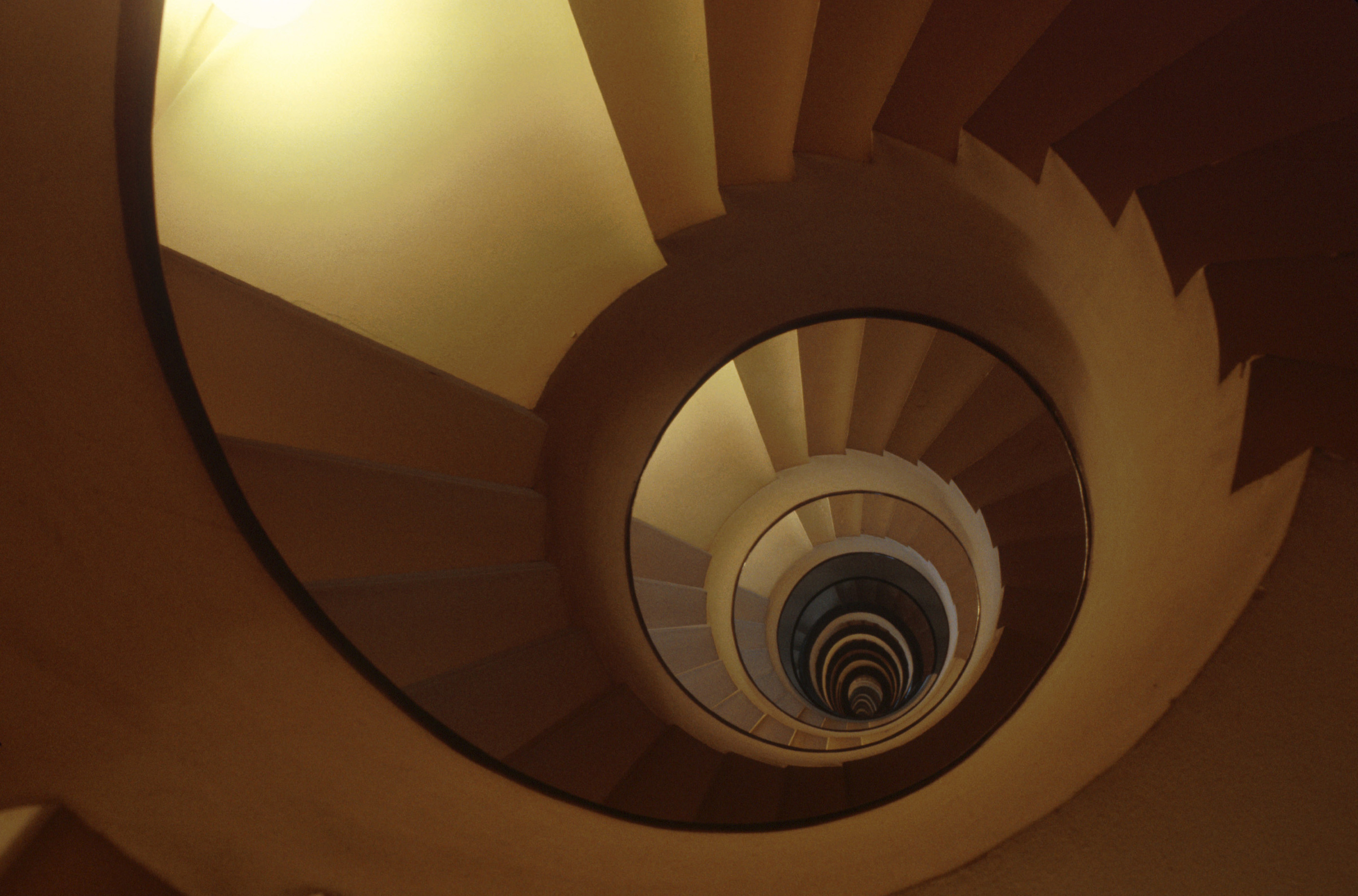 Escalier de la villa Martel (10, rue Mallet-Stevens, Paris), par Robert Mallet-Stevens